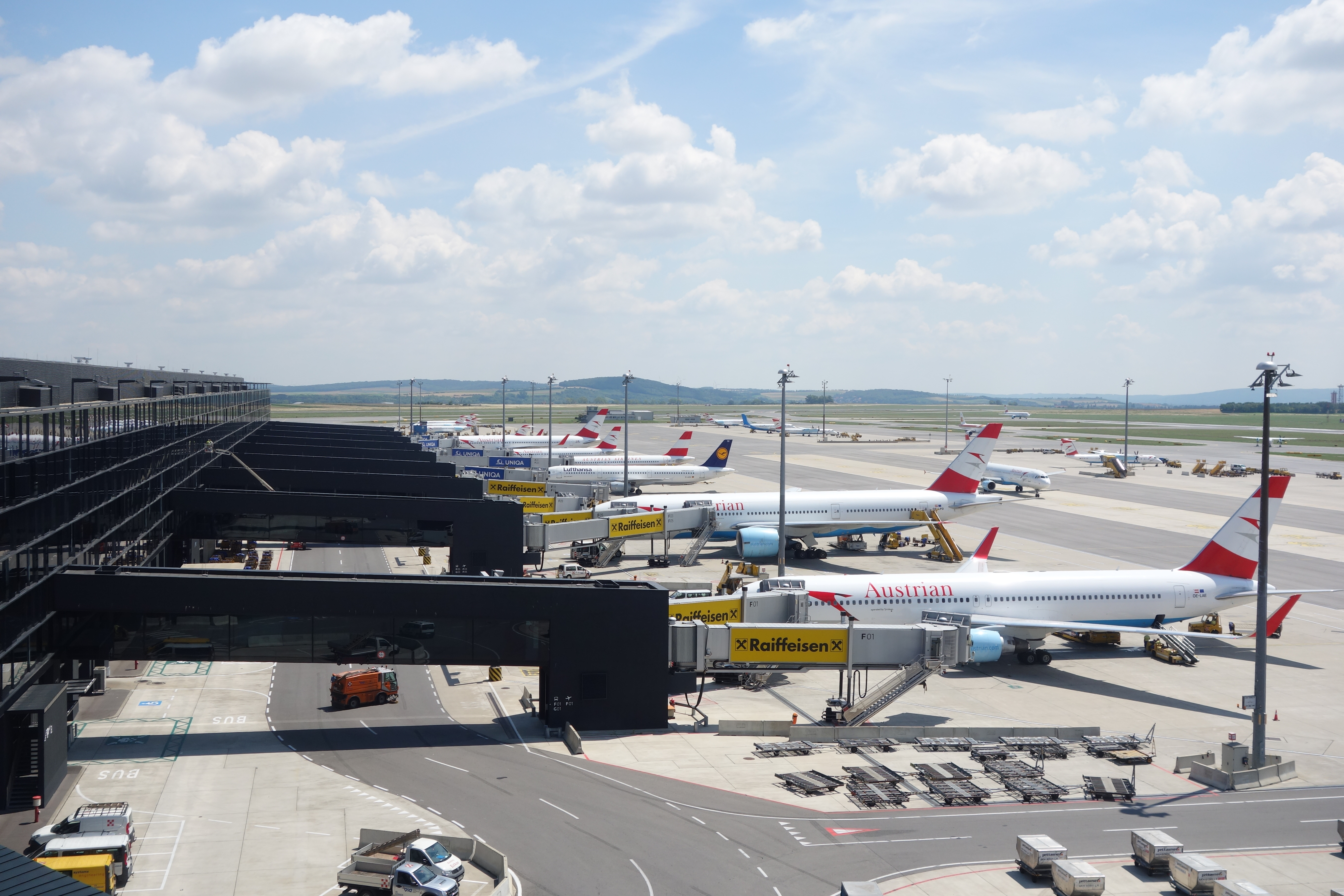 Blick auf die Südseite des Piers Nord (Terminal 3) am Flughafen Wien im Juli 2014. Die Aufnahme entstand von der Besucherterrasse.